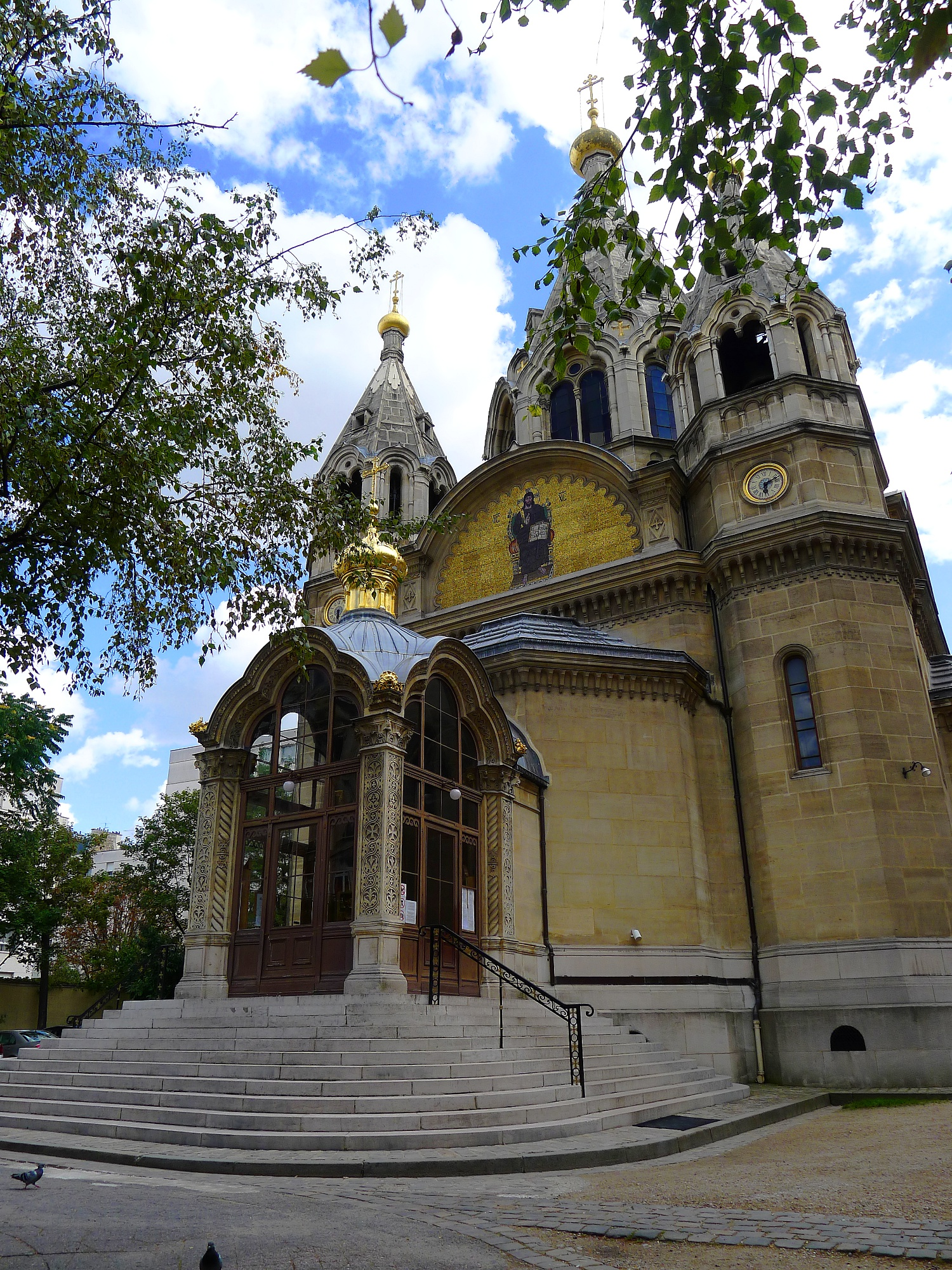 Cathédrale orthodoxe St-Alexandre-Nevski , rue Daru - Paris VIII